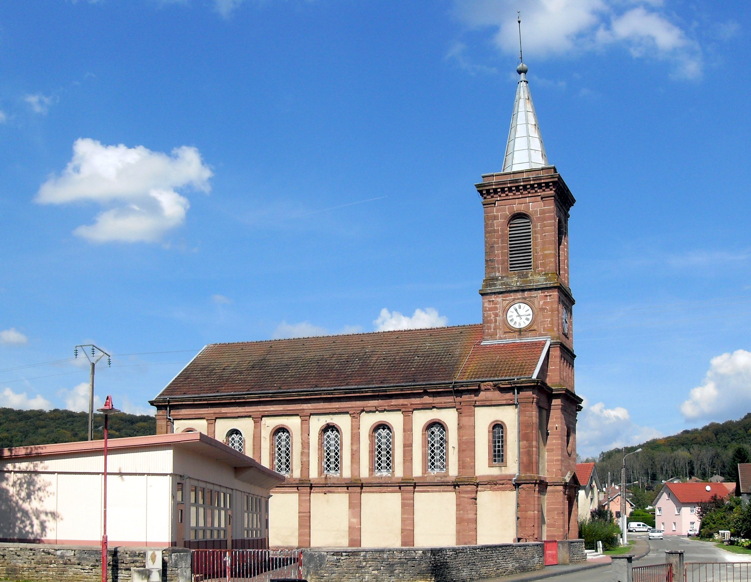 L'église luthérienne de Présentevillers